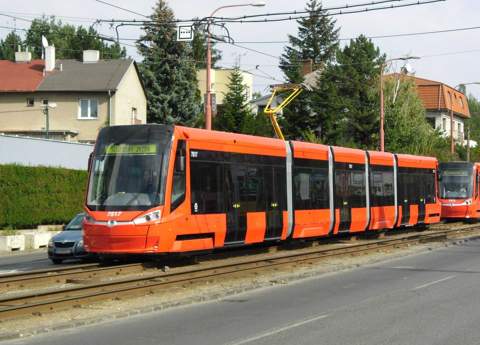 Električka Škoda 30 T, ev. č. 7517